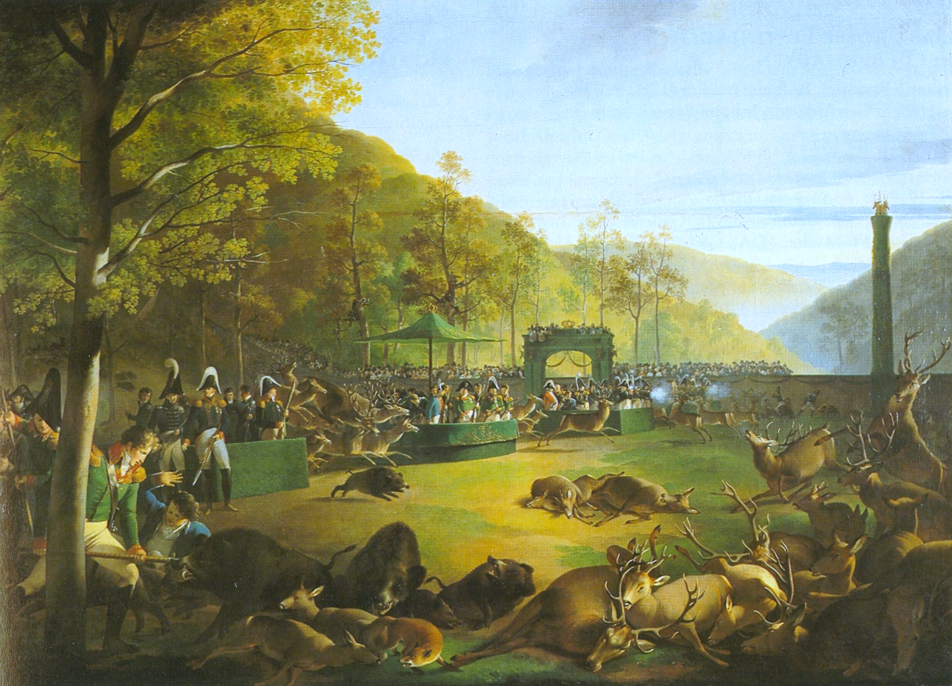 Das Festinjagen (Dianenfest) bei Bebenhausen 1812, Öl auf Leinwand (Reproduktion), Schlossverwaltung Ludwigsburg, Inv.Nr. KRGT 1499